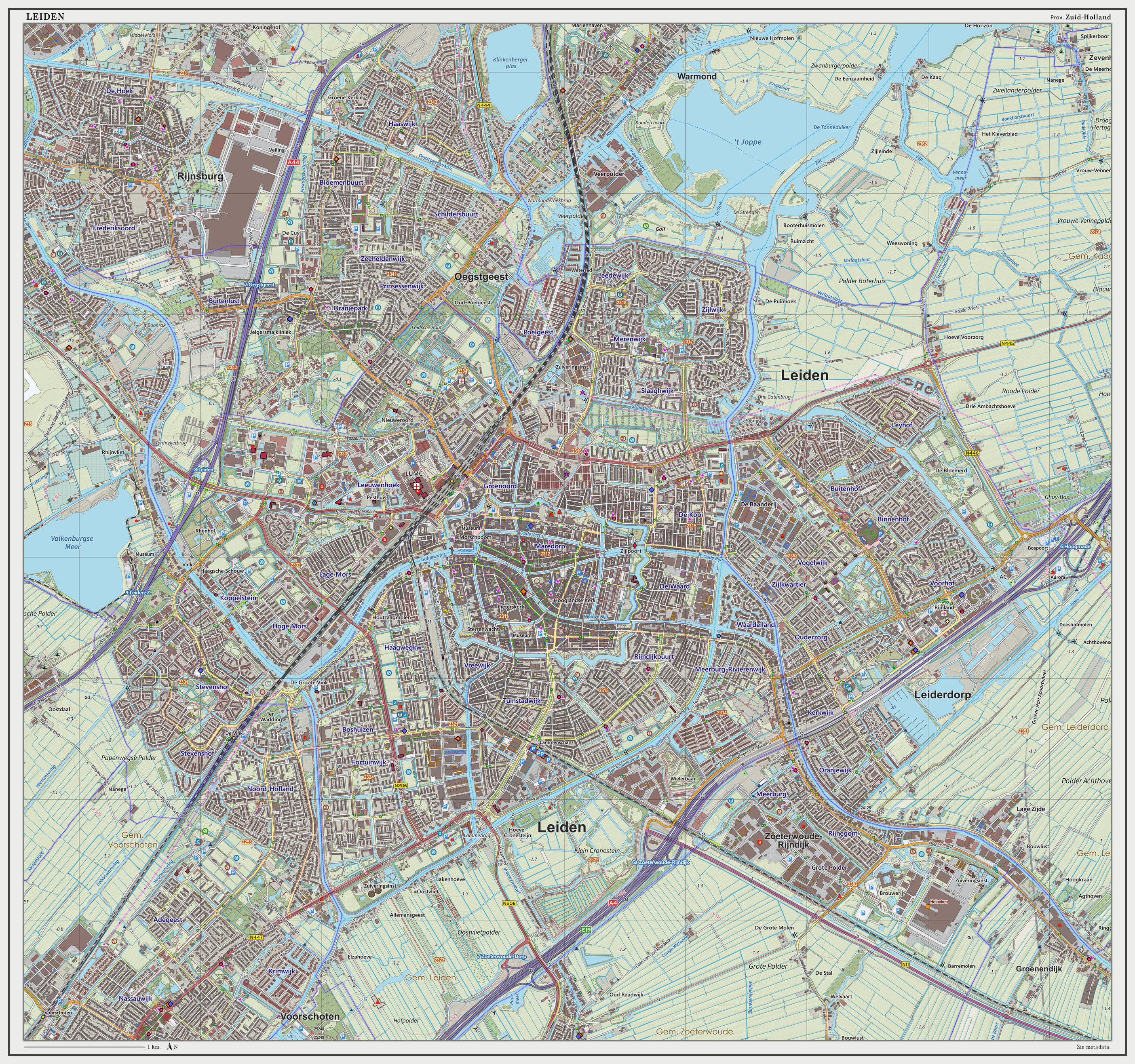 Topografische kaart van Leiden (woonplaats). Resolutie: 300 pixels/km. Kaartbeeld samengesteld uit de open geodata van de Top10NL en Top25namen (Basisregistratie Topografie, Kadaster), Creative Commons BY licentie. Gebouwvlakken uit open geodata BAG extract. Wegen uit de OpenStreetMap. Reliëfschaduw uit de Actuele Hoogtekaart AHN2. Samenstelling en kleurenschema: Jan-Willem van Aalst, met QGIS2. Zie ook de Legenda.